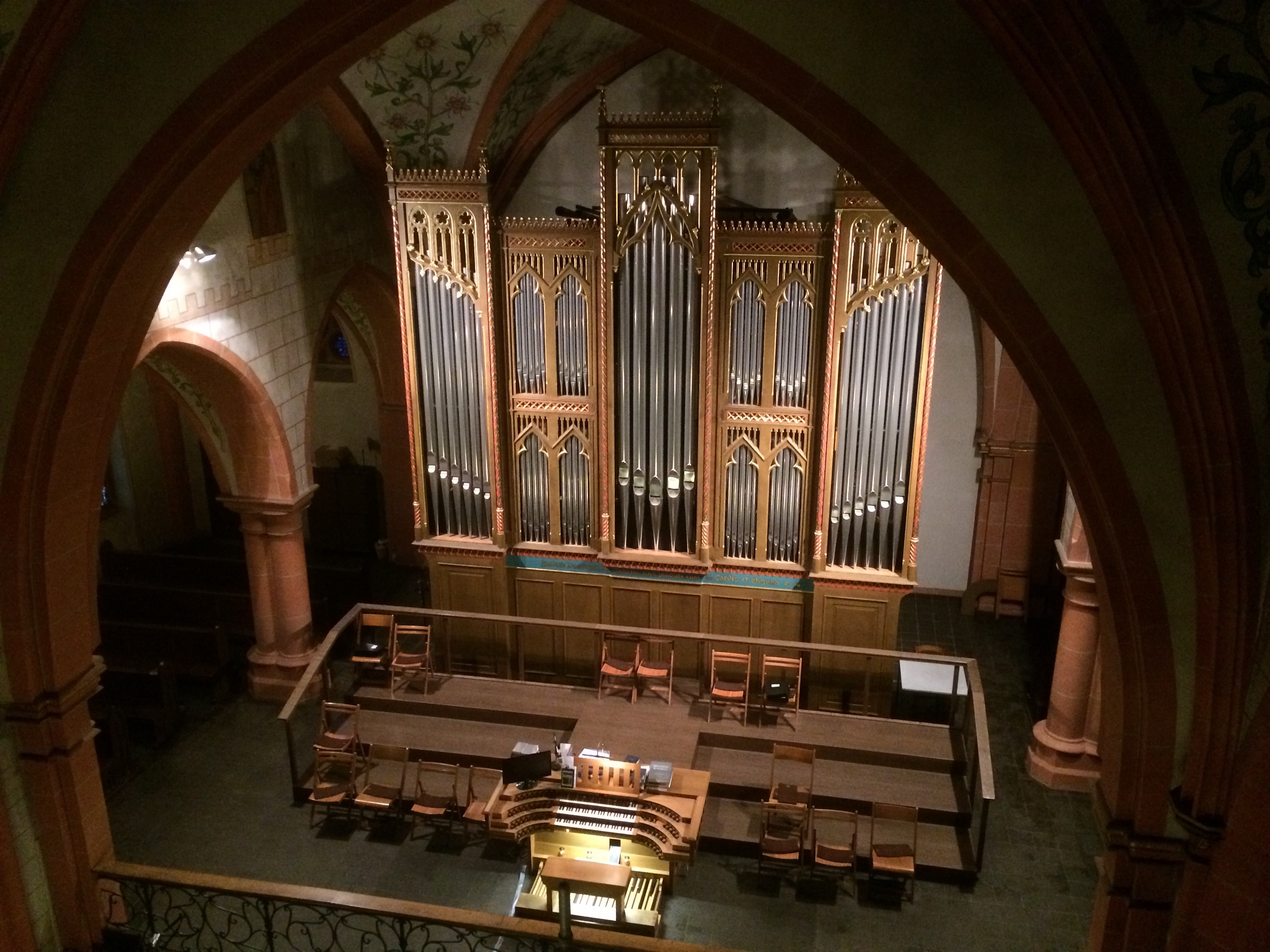 Göckel-Orgel im Westerwälder Dom